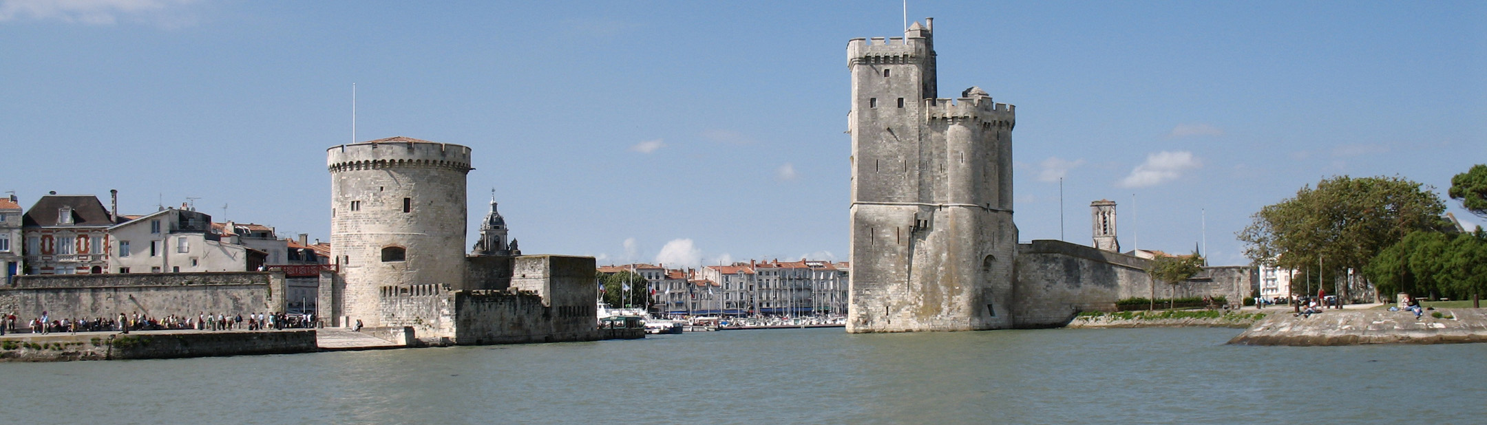 Entrée du port de La Rochelle, France